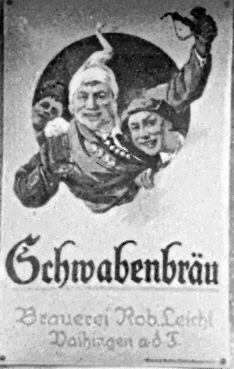 Tübingen, Schwabenbräu, Werbeplakat